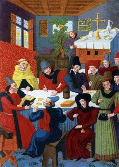 Выплата ренты. Миниатюра XV века